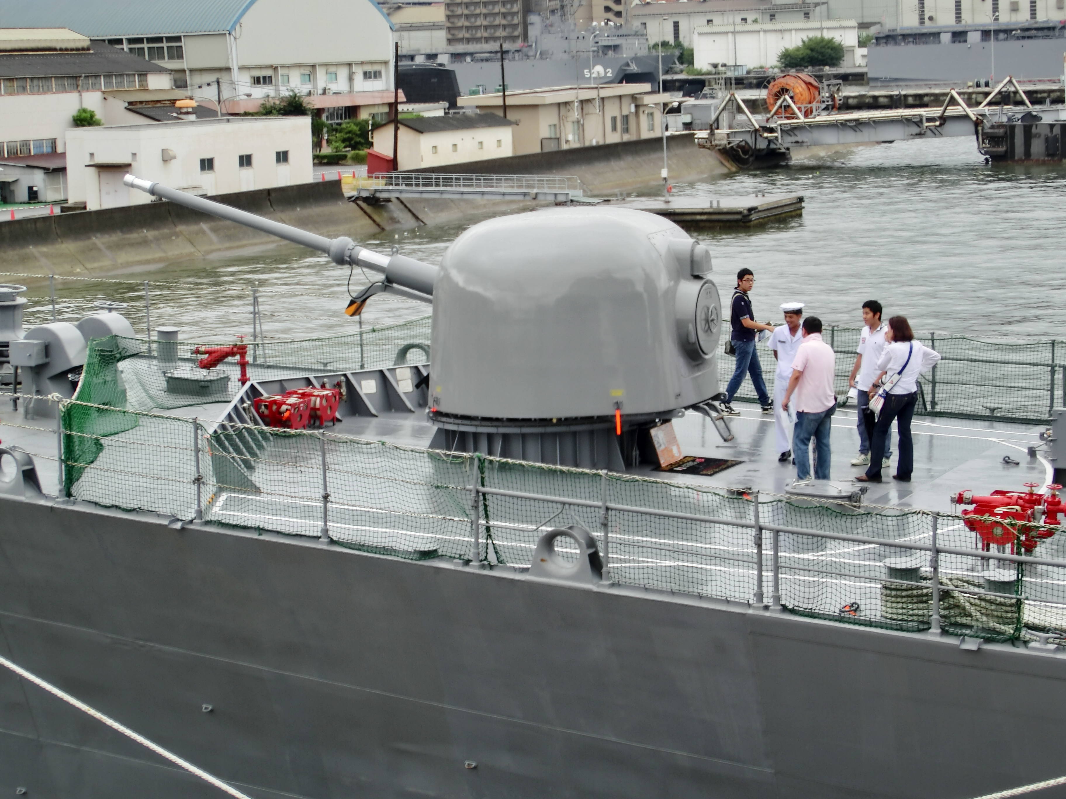 護衛艦はるゆきの76mm主砲塔